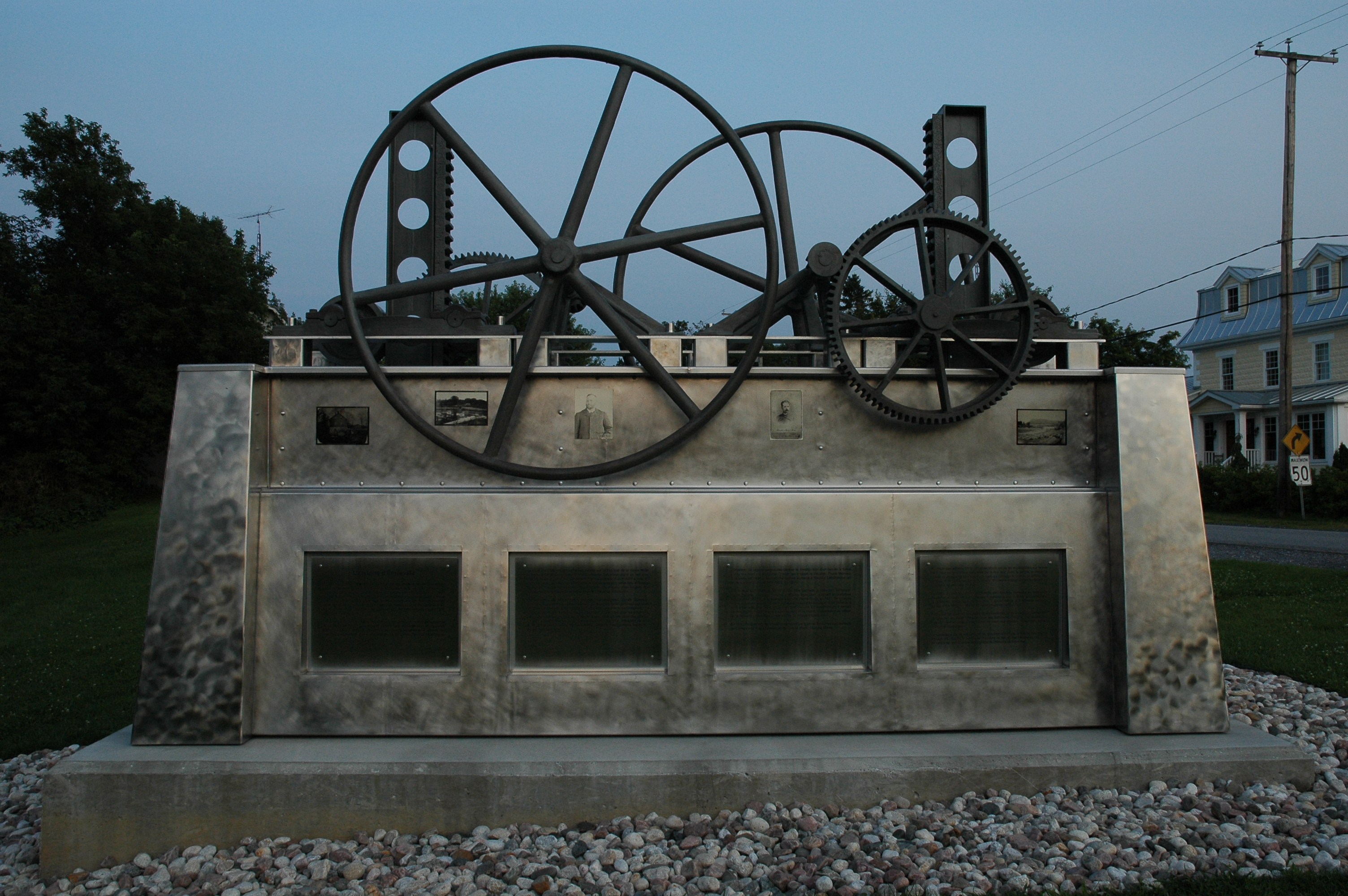 Monument de Richard Lebeau qui commémore l'histoire des vieux moulins de Saint-Pie, plus précisément d'Émileville.